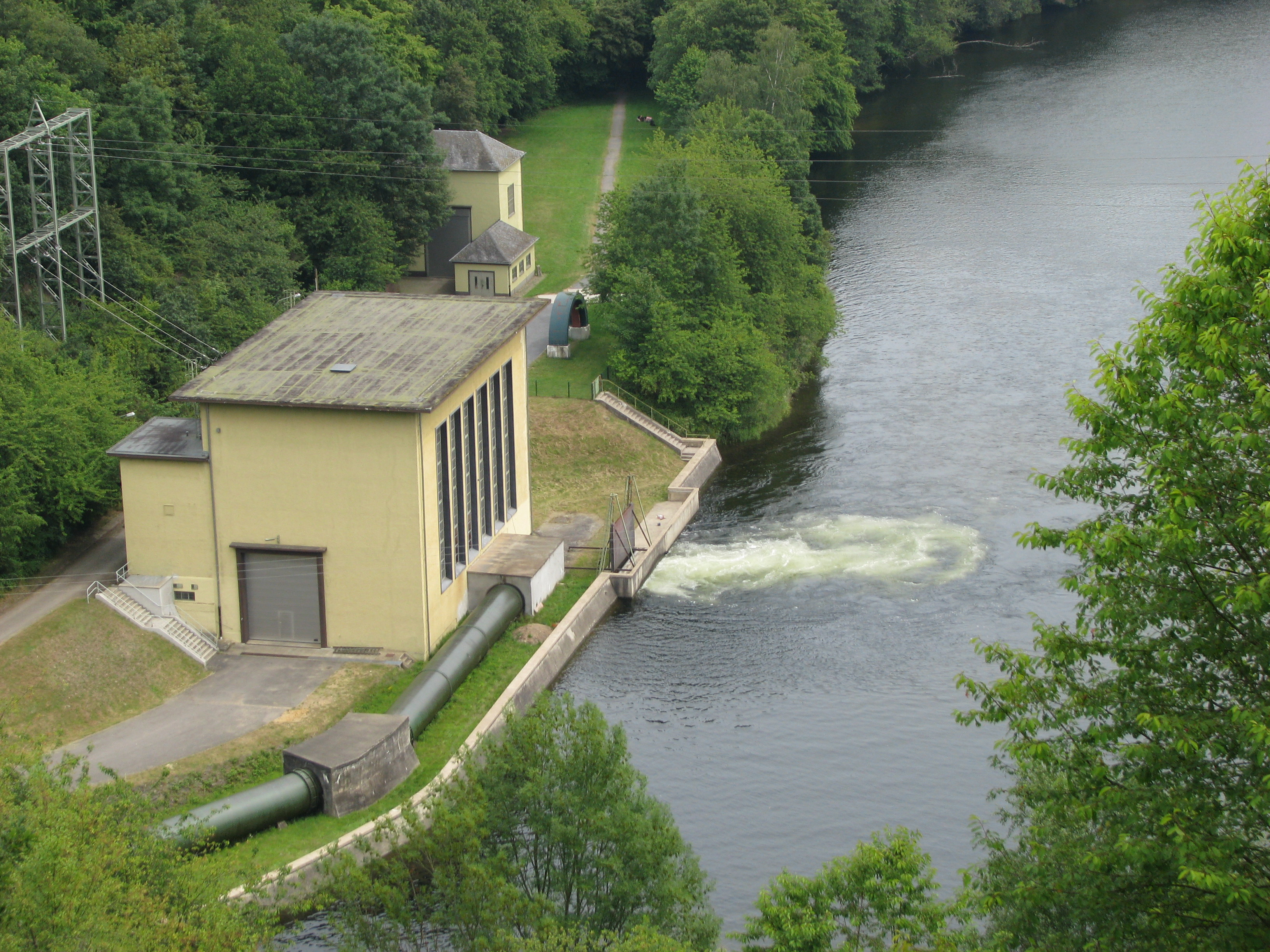 Blick vom Damm der Rurtalsperre auf das Wasserkraftwerk Schwammenauel. Das Kraftwerk besitzt eine Francis-Turbine und dient der Deckung des Spitzenstrombedarfs. Es leistet im Mittel eine Jahresarbeit von fast 25 Mio. Kilowattstunden. Die maximale Leistung bei entsprechendem Wasserdruck (Stauhöhe) und großer Wasserabgabe (ca. 32 m³/s) beträgt 15.000 kW = 20.000 PS!